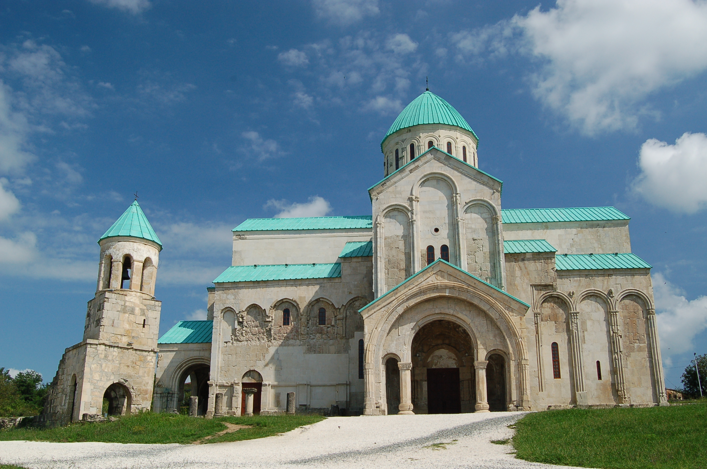 Katedra Bagrati